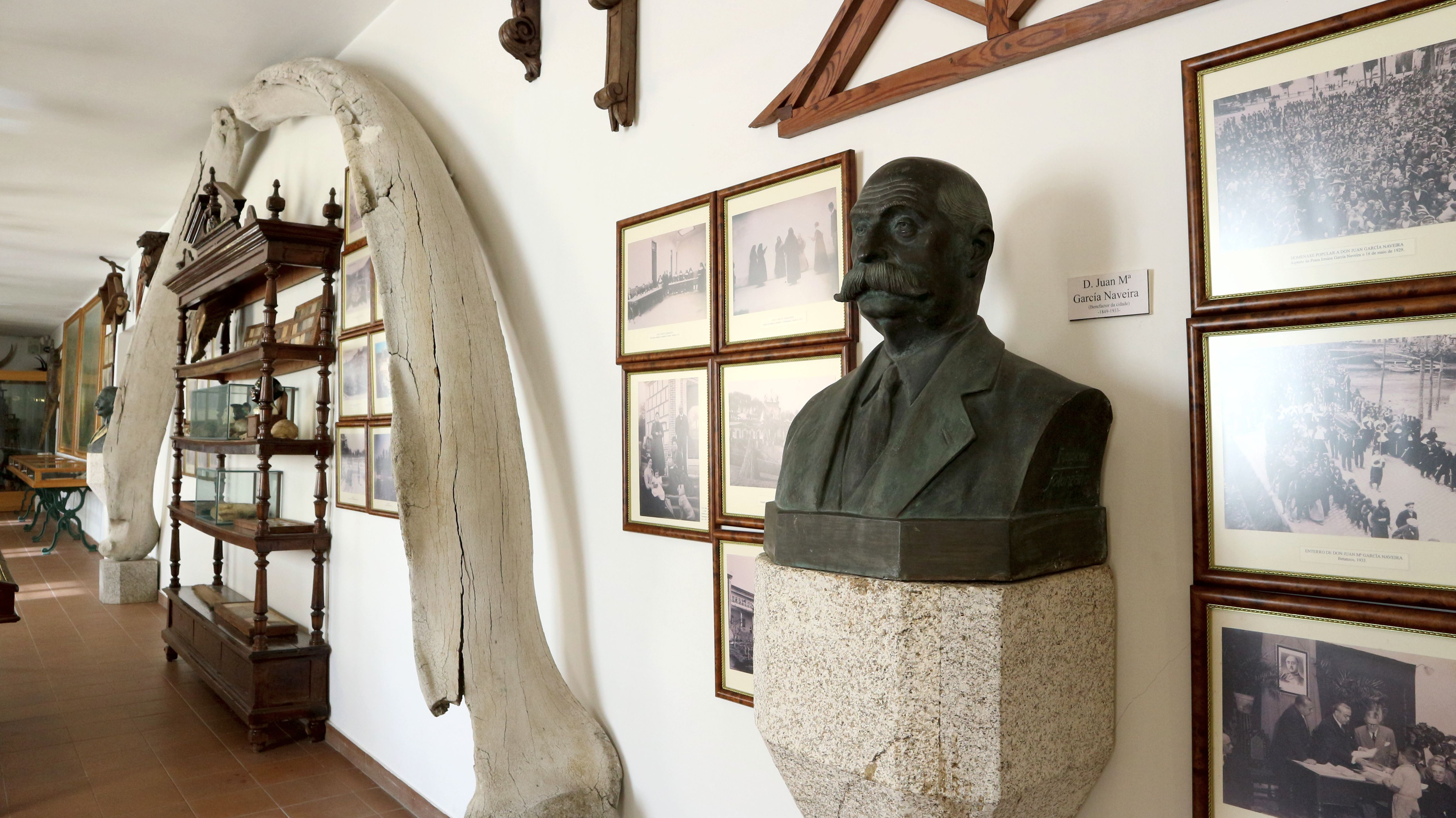 Sección da exposición con Juan García Naveira no centro do Museo das Mariñas, Betanzos.